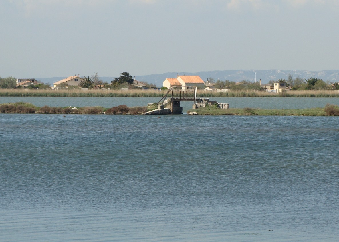 Communication entre l'étang de Bolmon (au second plan) et le canal de Marseille au Rhône (au premier plan). Derrière, le cordon du Jaï, partie habitée côté Châteauneuf-les-Martigues.